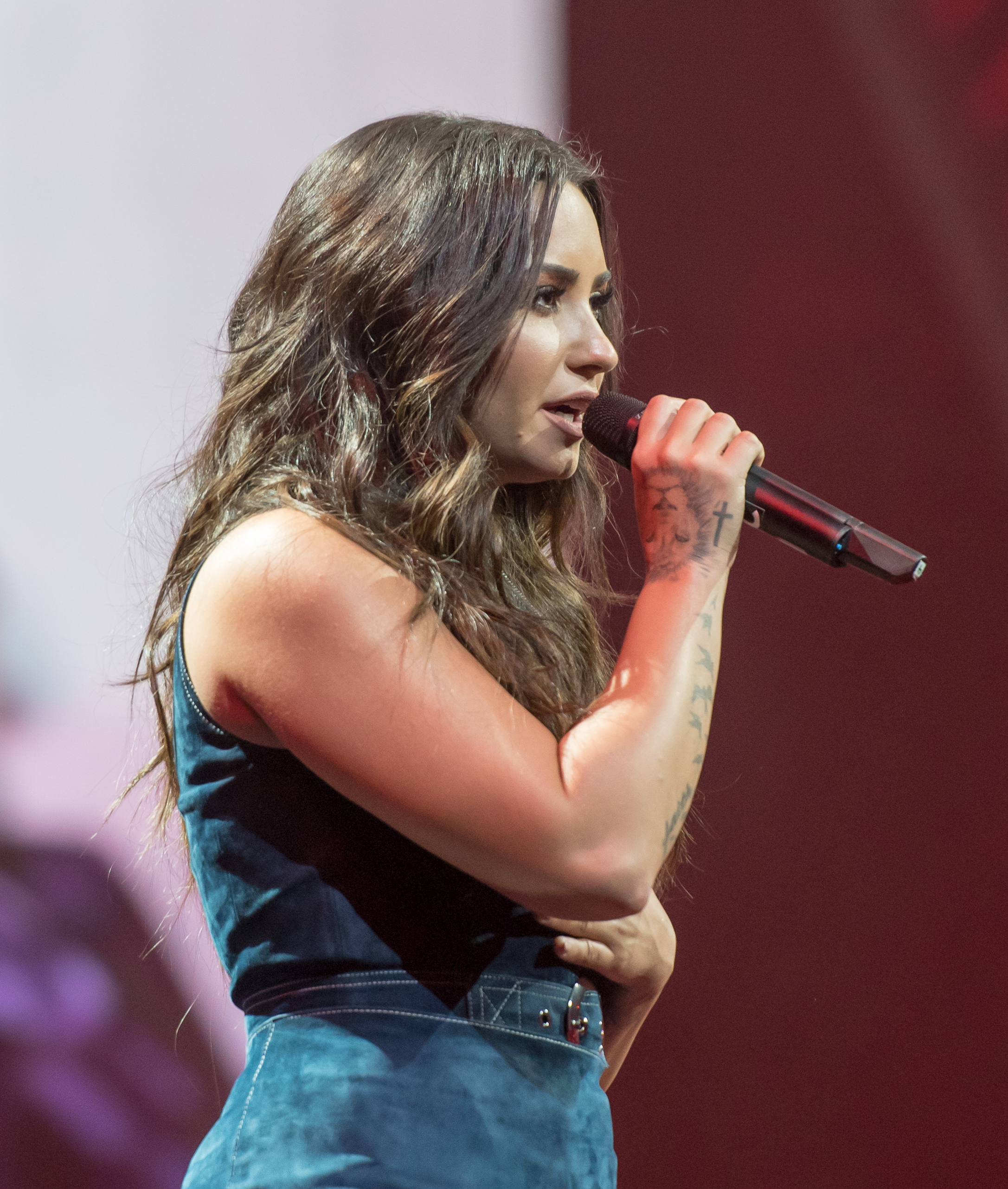 Demi Lovato beim Global Citizen Festival in Hamburg